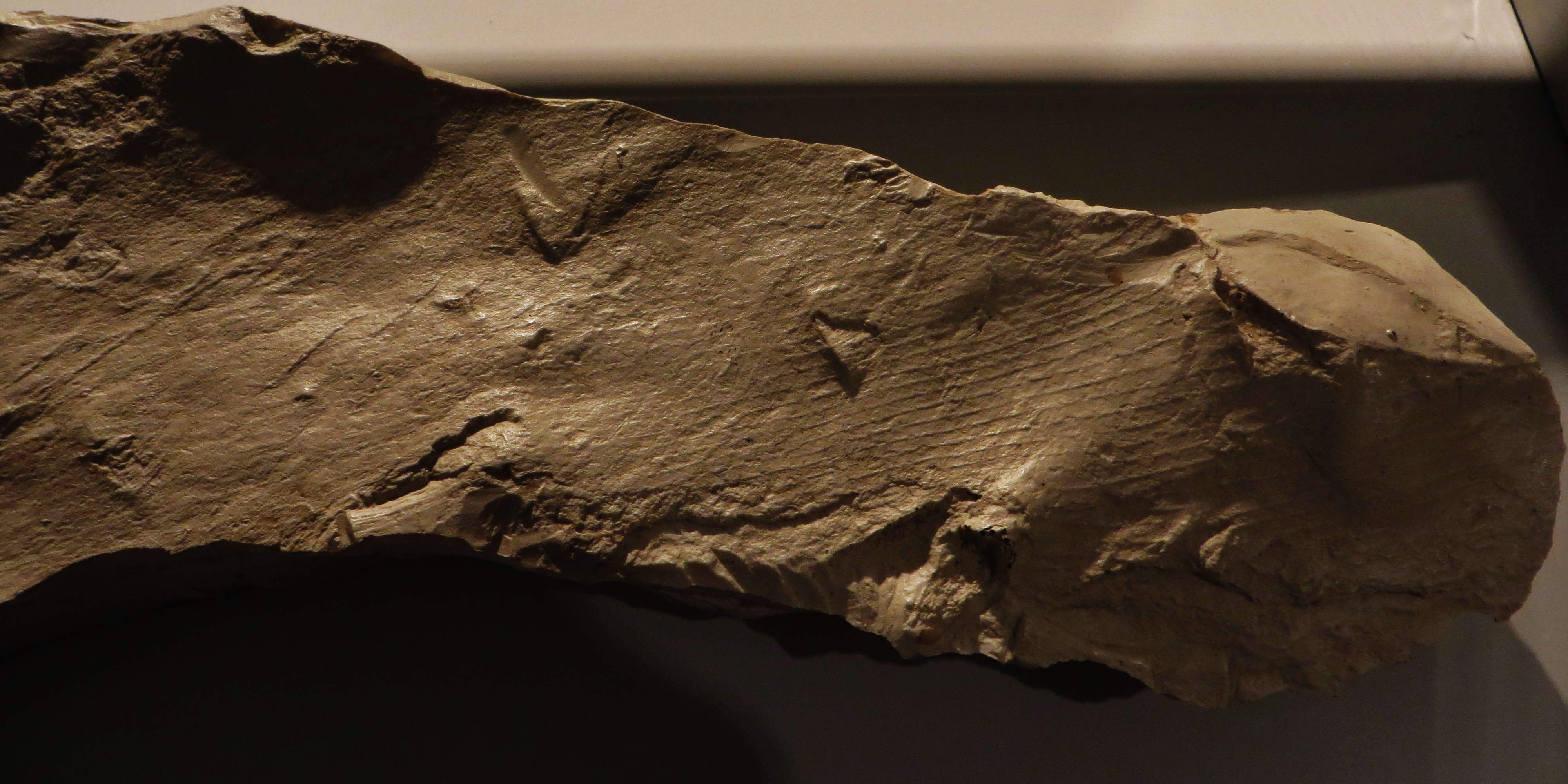 Fossil - Took The picture at Royal Belgian Institute of Natural Sciences, Brussels